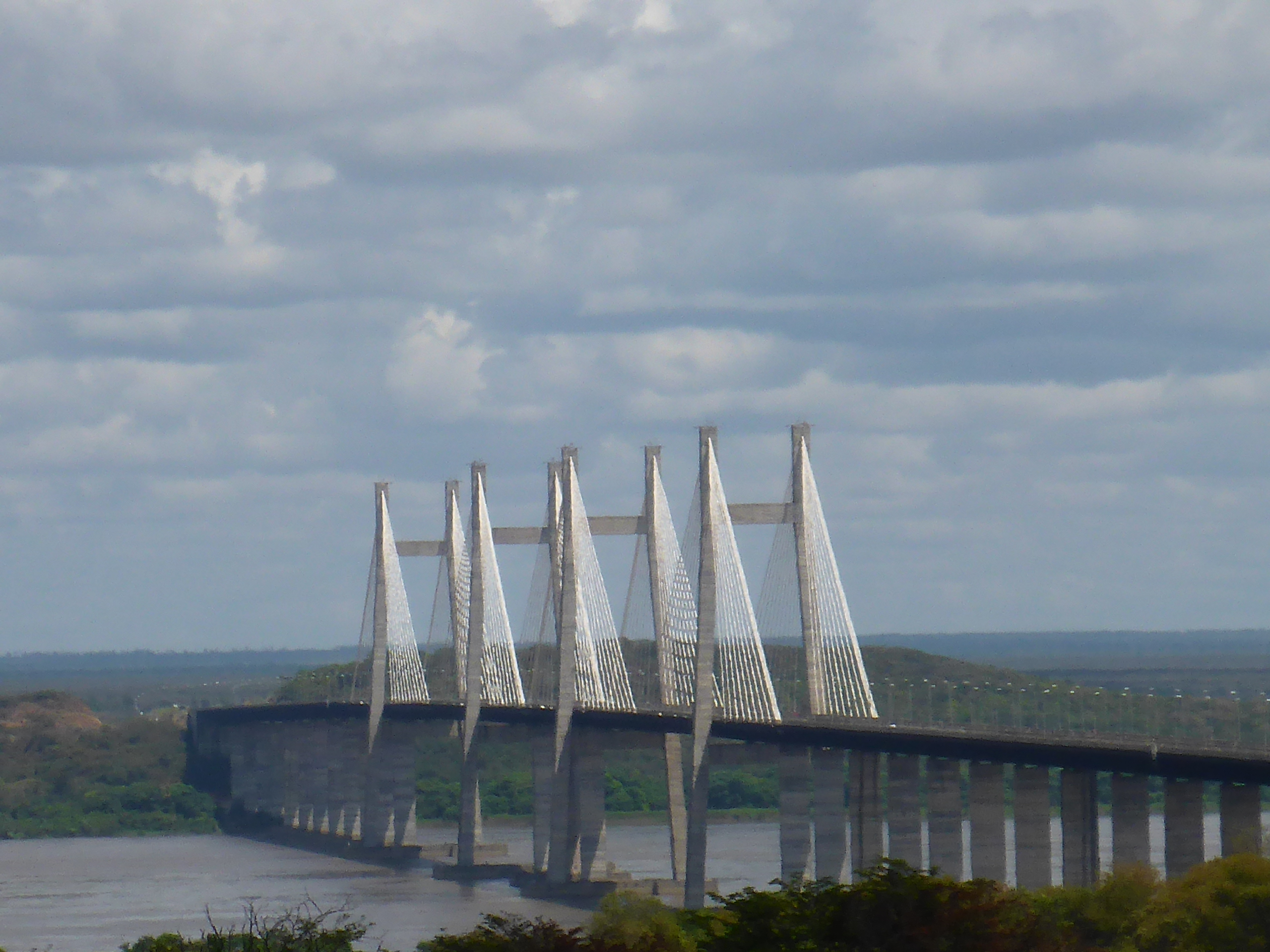 Estado Bolívar